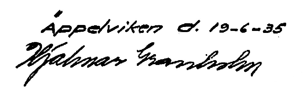 Hjalmar Granholms namnteckning på en k-ritning